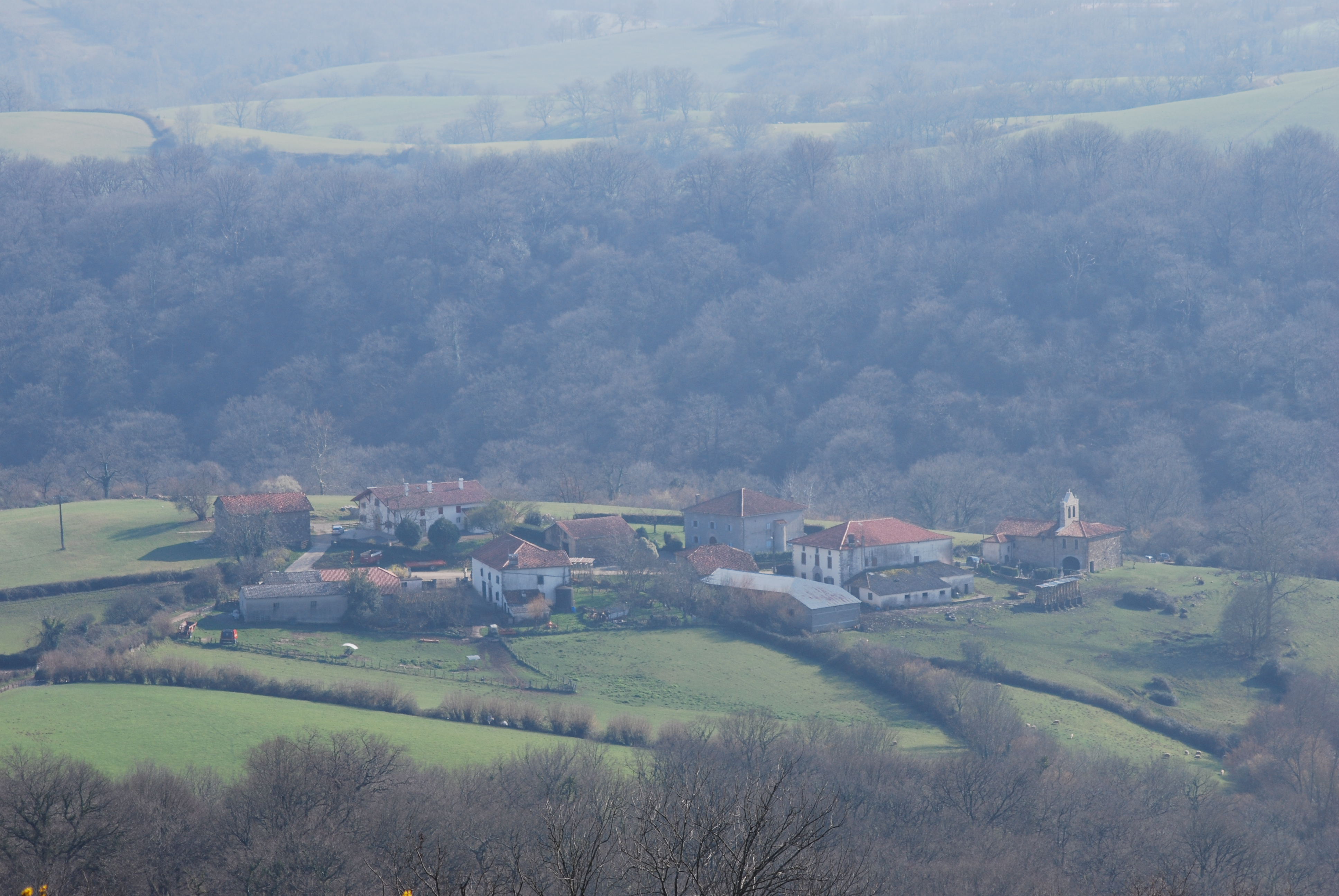 Le hameau de Harambeltz vu d'une hauteur.